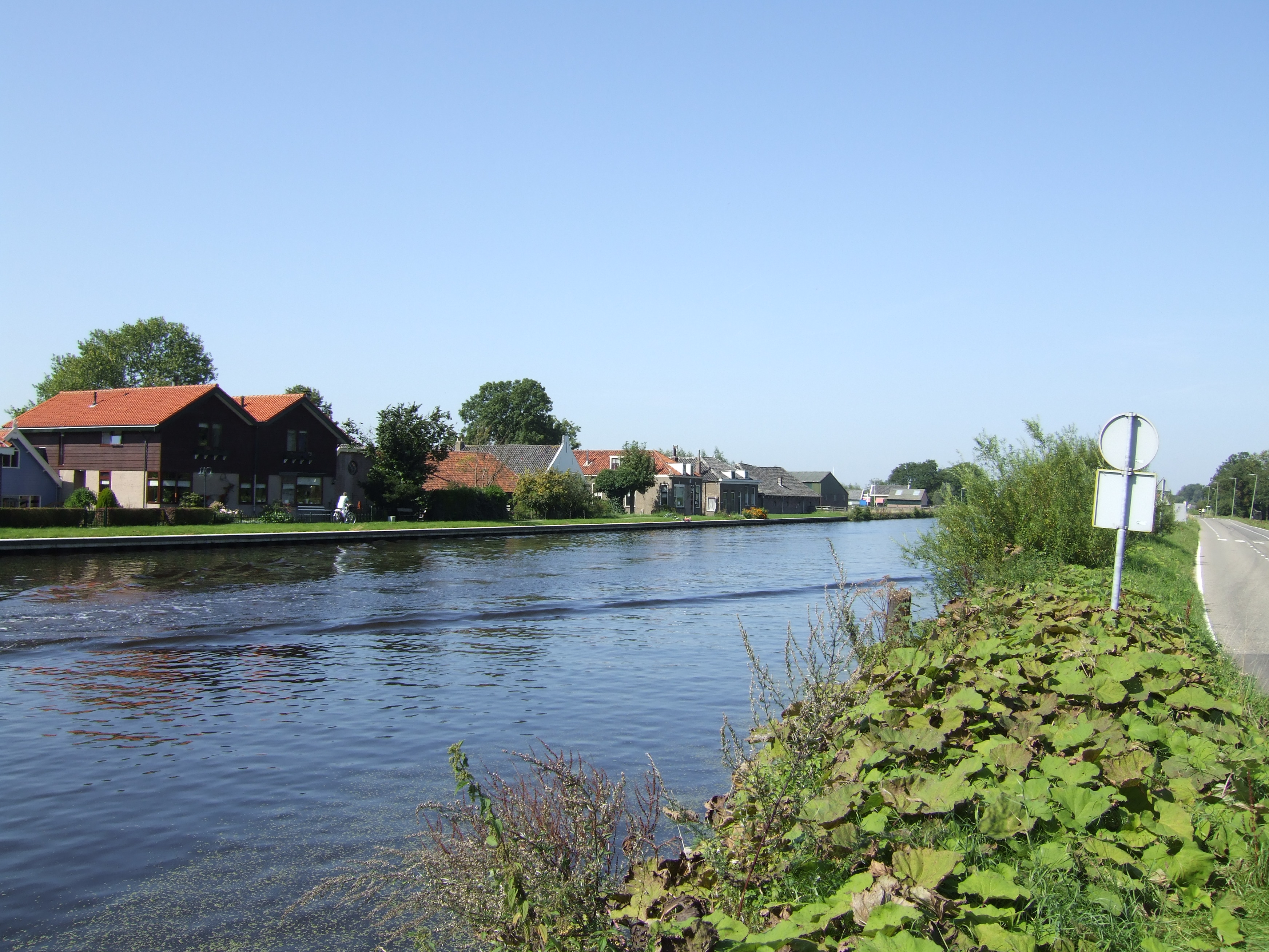 De Kandelaar, 10 september 2006